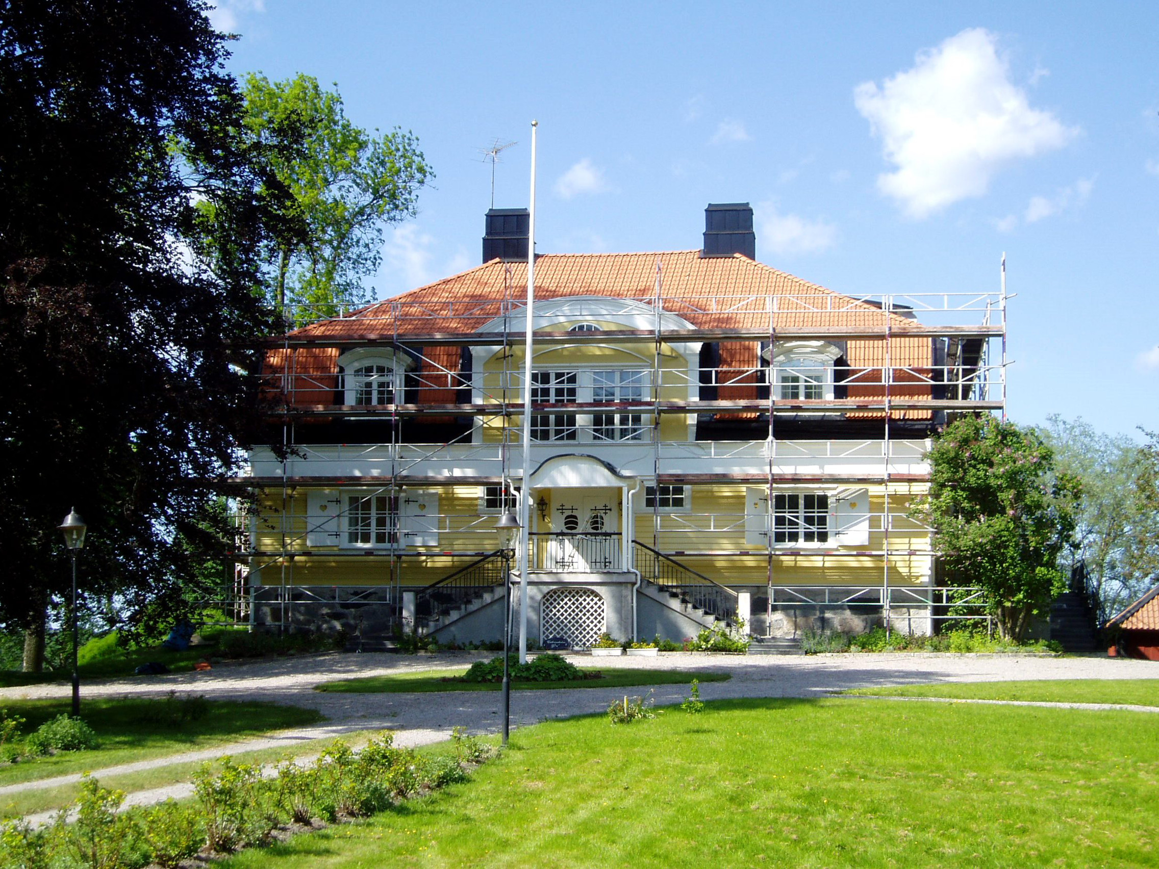 Catrineholms gård, Katrineholm